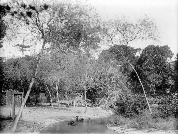 Repronegatief. Australische zwanen in de zwanenvijver van de dierentuin te Surabaja